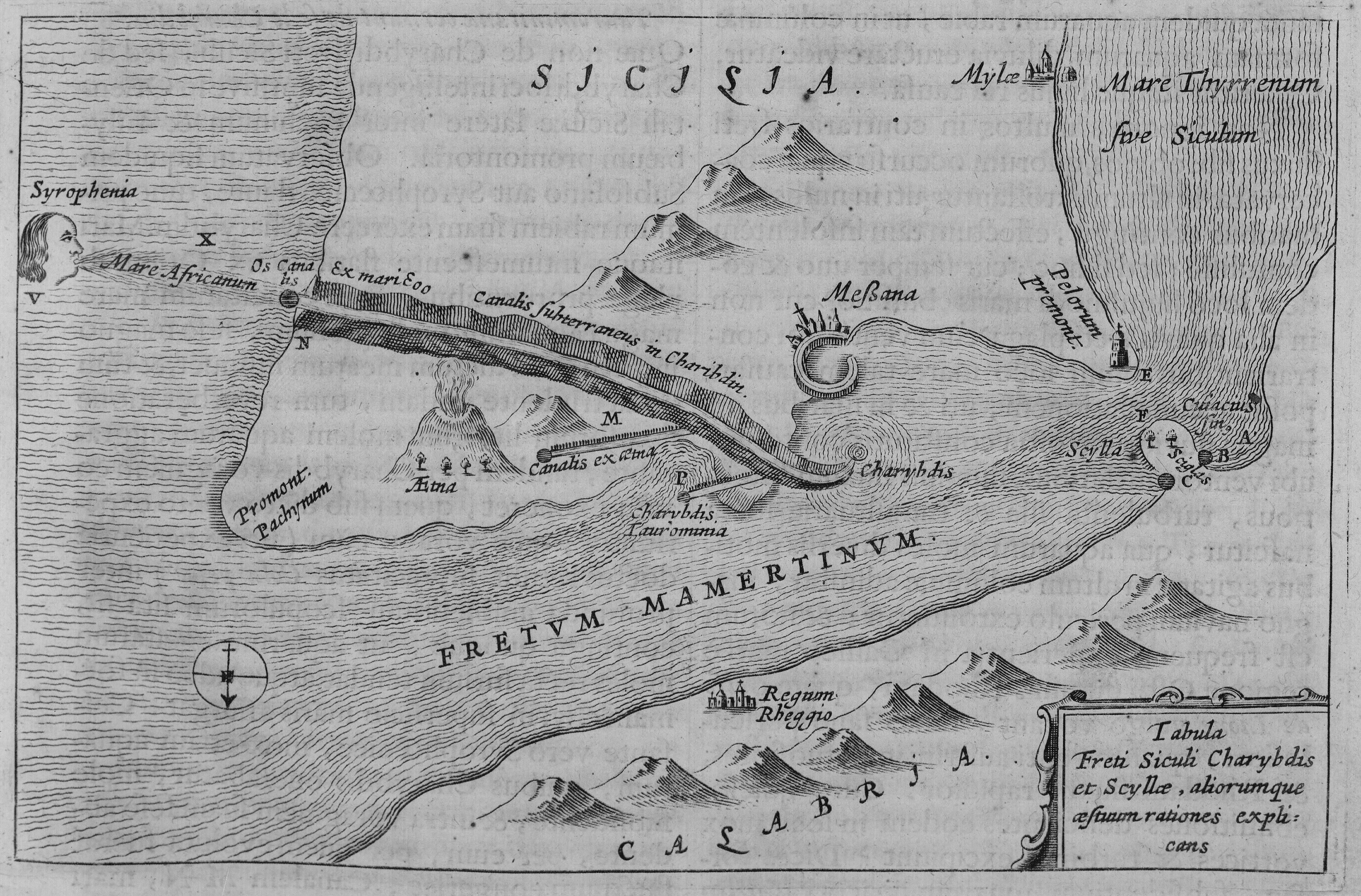 Autor: Kircher, Athanasius,|c(S.I.),1602-1680 Descripción bibliográfica: Athanasii Kircherii e Soc. Iesu Mundi subterranei tomus II: bin V. libros digestus quibus mundi subterranei fructus exponuntur... - Amstelodami :|bapud Joannem Janssonium et Elizeum . - Weyerstraten, 1664 . - [12], 487, [9], [7] h. de grab. y [5] de tablas pleg. : il. ; Fol. - Texto a dos col. con apostillas marginales - Front. calc.: "C. Vande Pas delineavit, A. Siourtsma sculpsit" . - Grabados calc. en interior representaciones de animales, máquinas... Ilustrador: Siourtsma, A., il. Impresor: Jansson, Johann, imp. Impresor: Weyerstraten, Elizeus, imp. Lugar de impresión: Holanda, Amsterdam -Localización: Vea la ilustración en su contexto